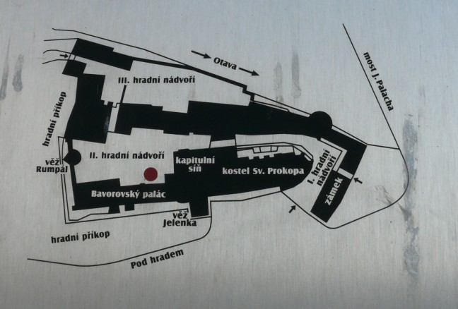 Plánek